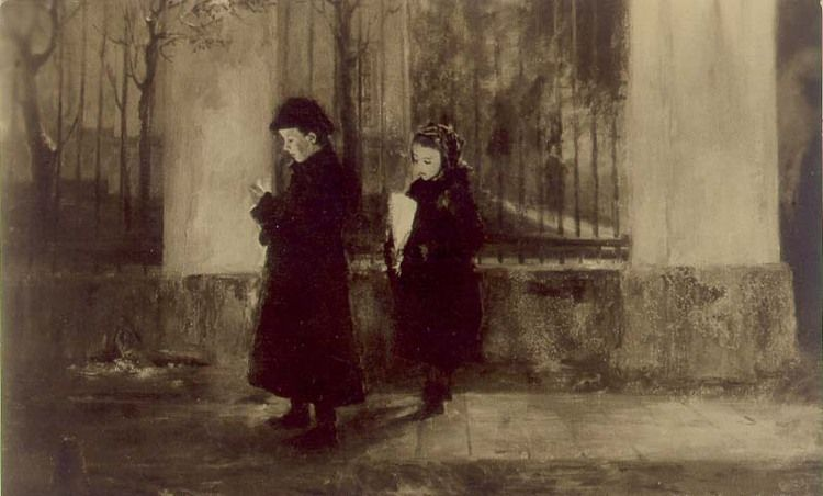 картина художника Алексея Остроградского (1867 - 1943)